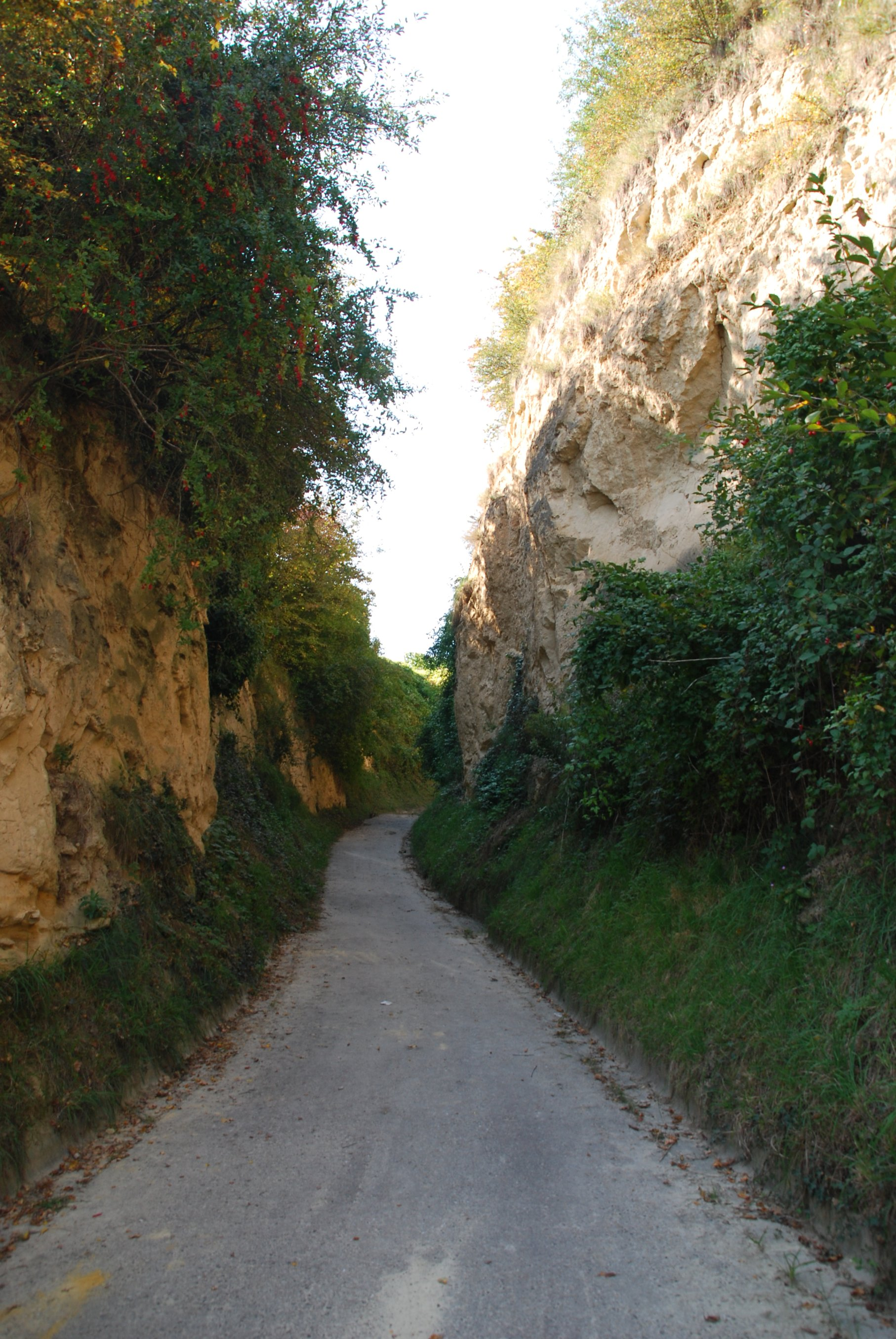 Lößhohlgasse Eichberg im Kaiserstuhl in Vogtsburg-Bickensohl